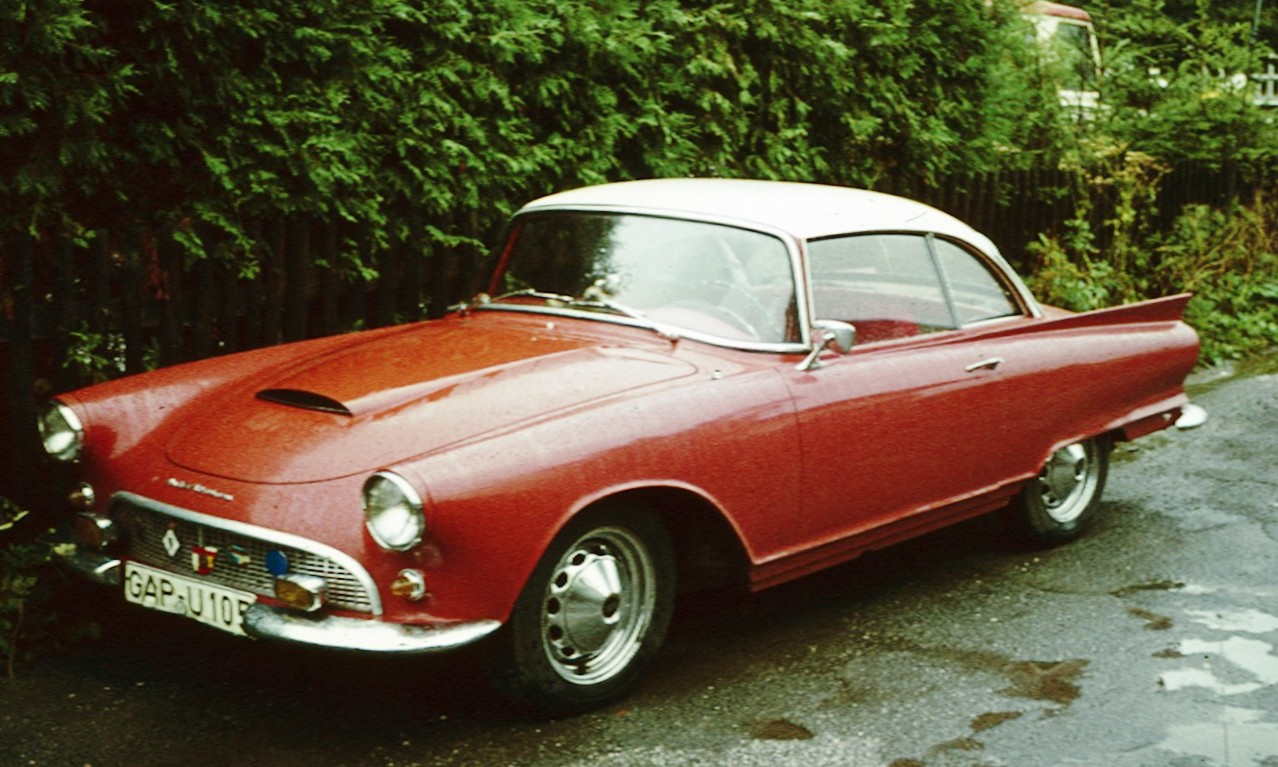 Auto Union 1000 Sp Garmisch-Partenkirchen